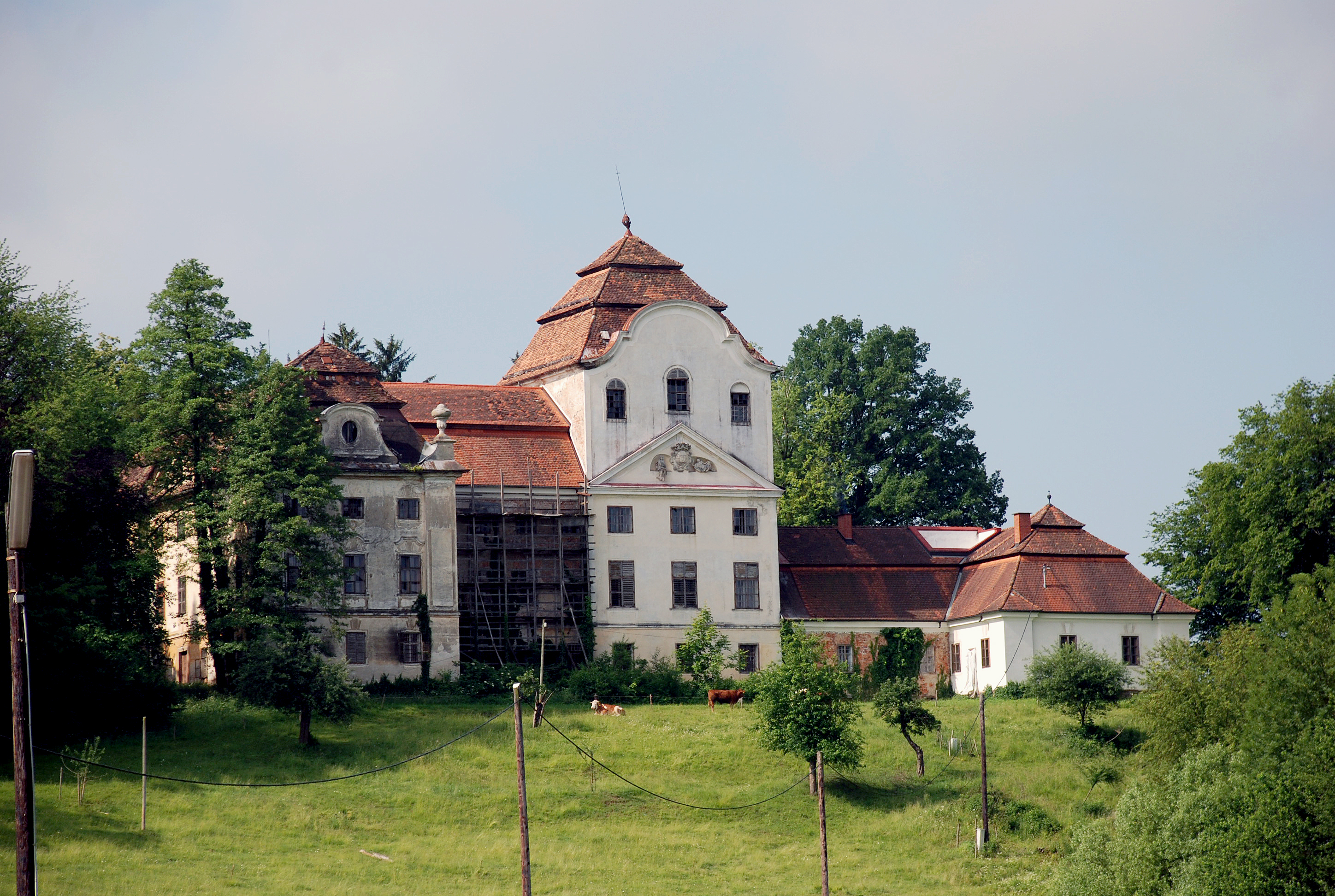 Sulmeck-Greith, Steiermark, Österreich: Schloss Welsberg im Ortsteil Dietmannsdorf